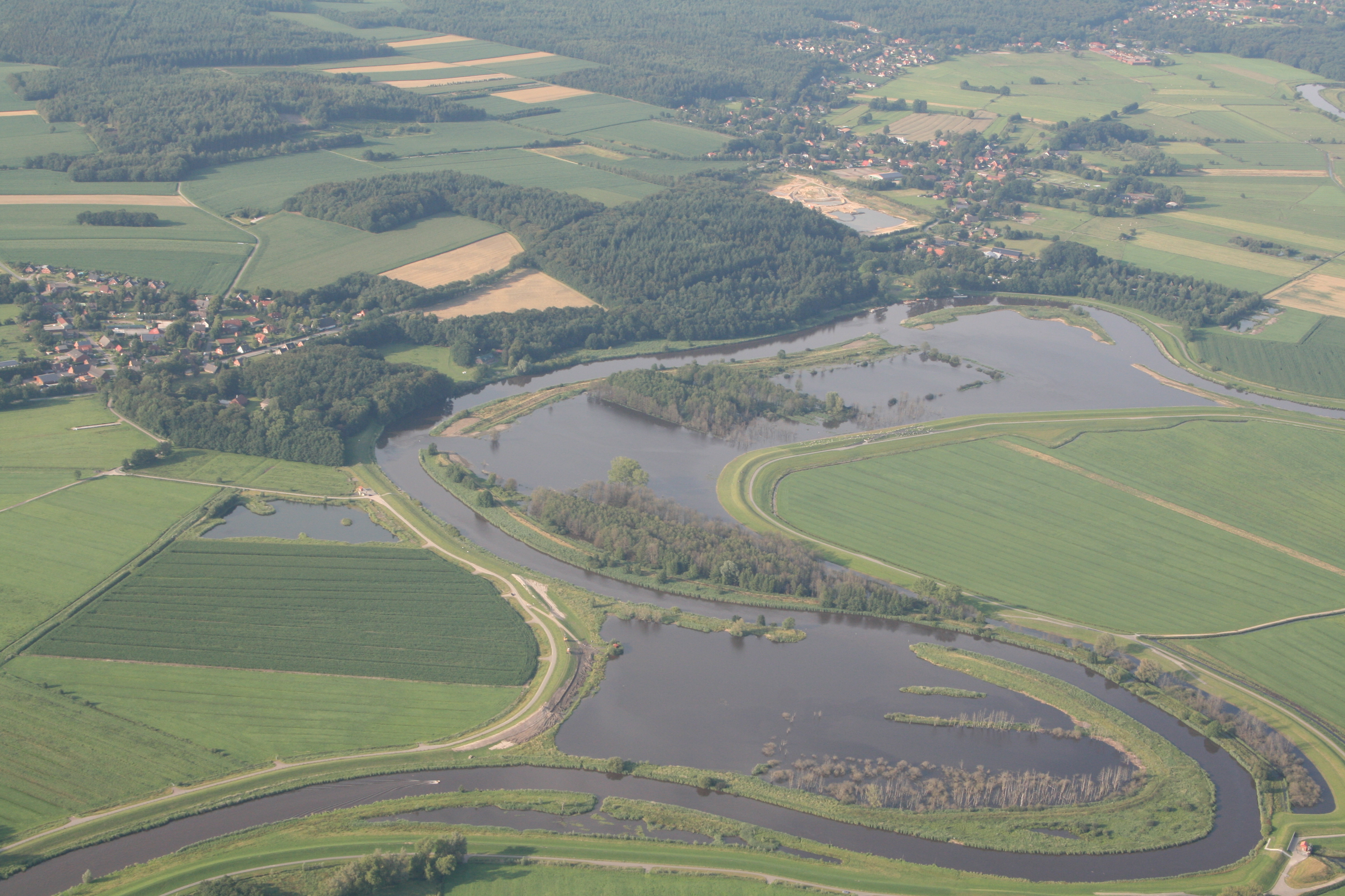 Pütten an der Oste bei Hechthausen